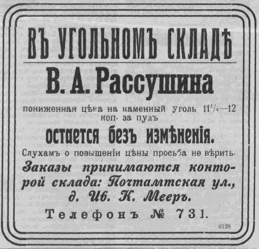 Объявление угольного склада В А Рассушина